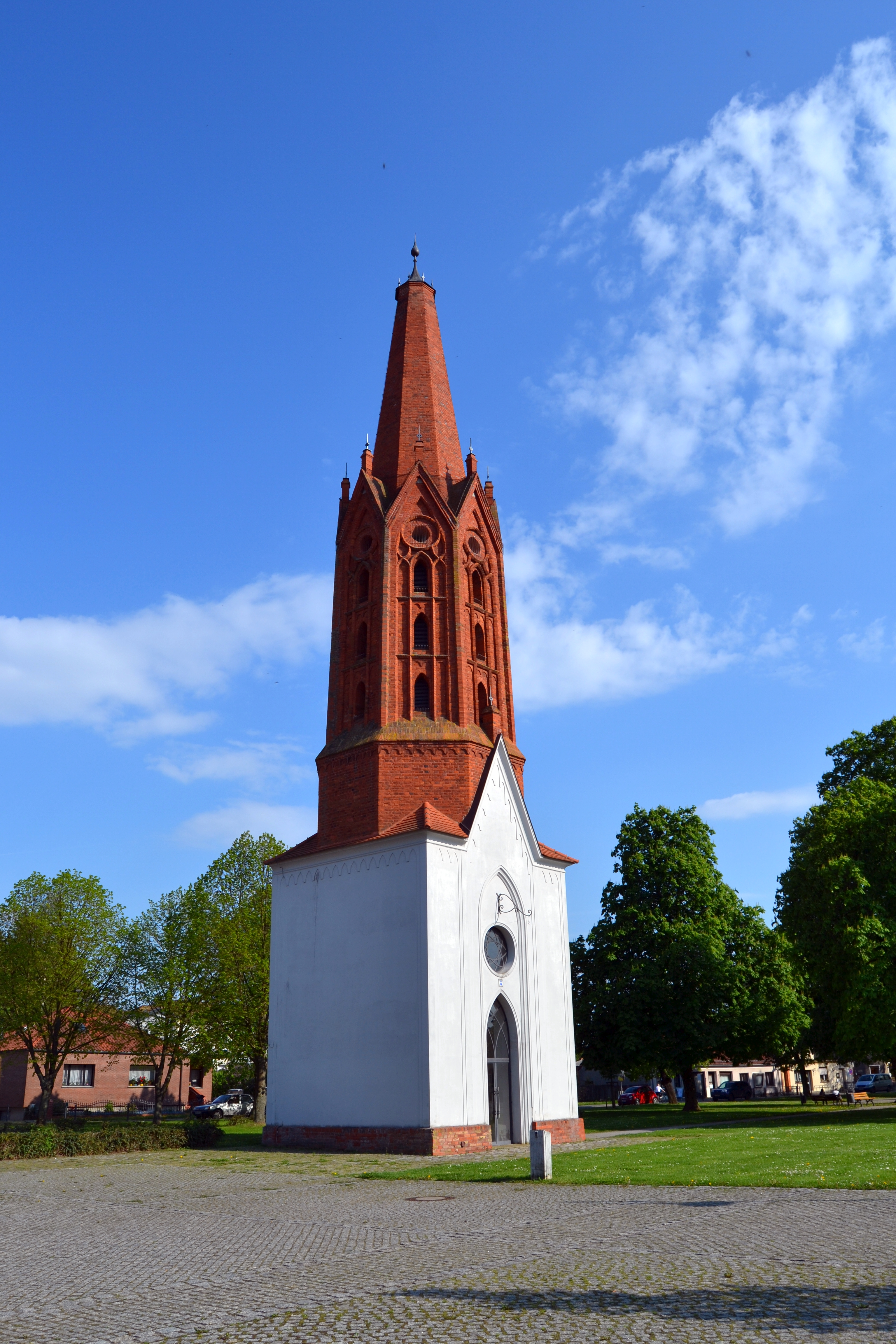 Fotoprojekt – Zwischen Berlin und Oder 2014 Photo project “Between Berlin and River Oder 2014” Baudenkmal Turm und Ausstattung der ehemaligen Dorfkirche in Letschin, Gemeinde Letschin; Der Kirchturm wurde in den Jahren 1818 bis 1819 nach einem Entwurf von Schinkel erbaut. Die dazugehörige Kirche wurde 1973 / 1974 abgebrochen, nachdem sie im Jahre 1945 weitgehend zerstört wurde.